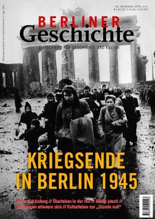 Dies ist das Cover der Erstausgabe der Zeitschrift "Berliner Geschichte" vom April 2015.